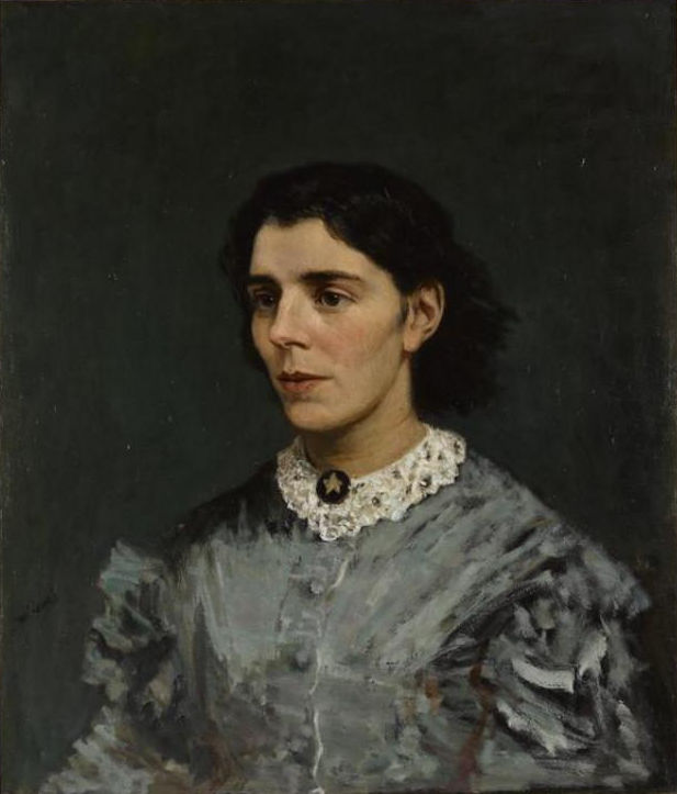 Portret van Estella Hijmans-Hertzveld door Jozef Israëls